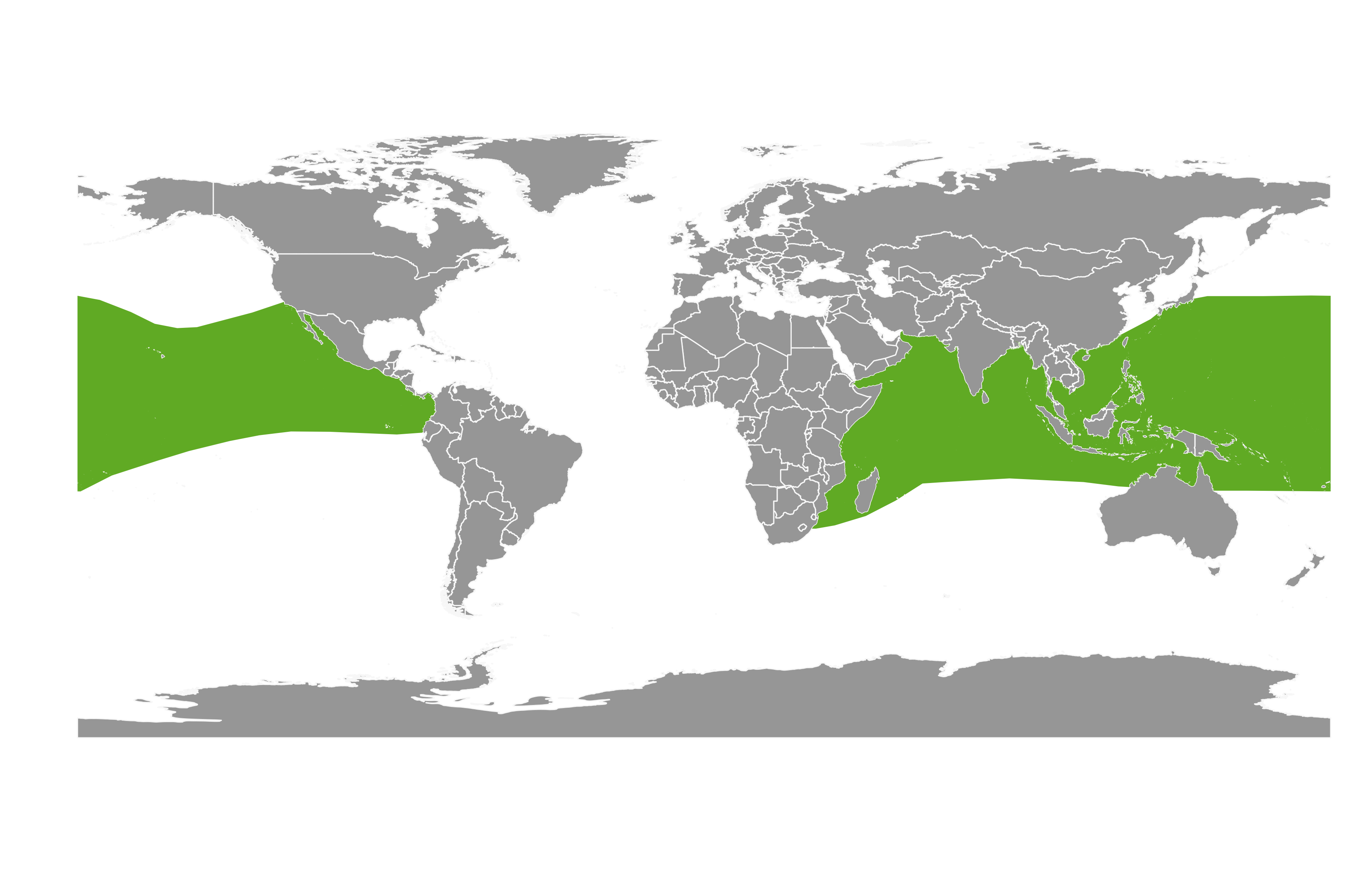 Distribución de Indopacetus pacificus